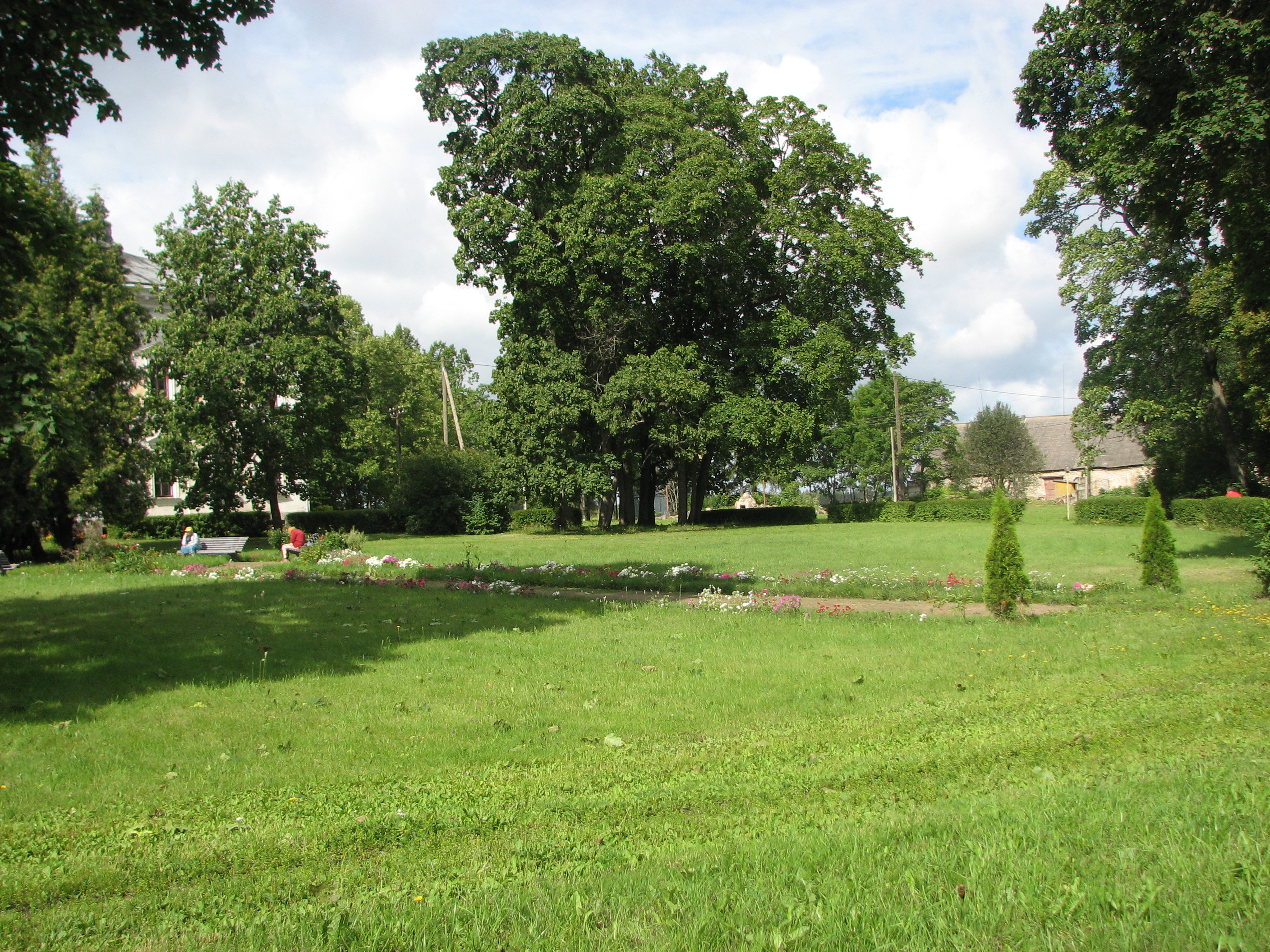 Udriku mõisa park